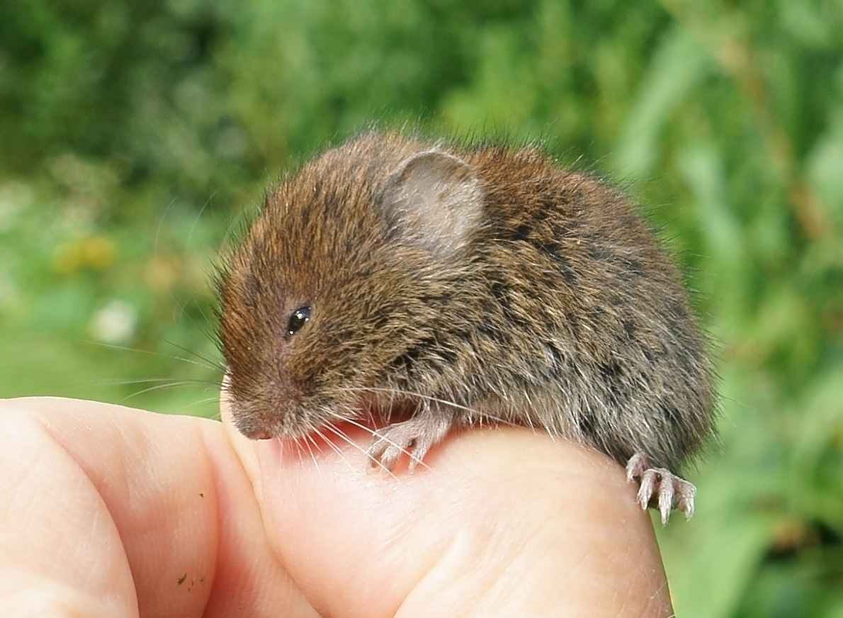 junge Erdmaus (Microtus agrestis) in DE-Bremen